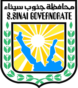 شعار محافظة جنوب سيناء، مصر